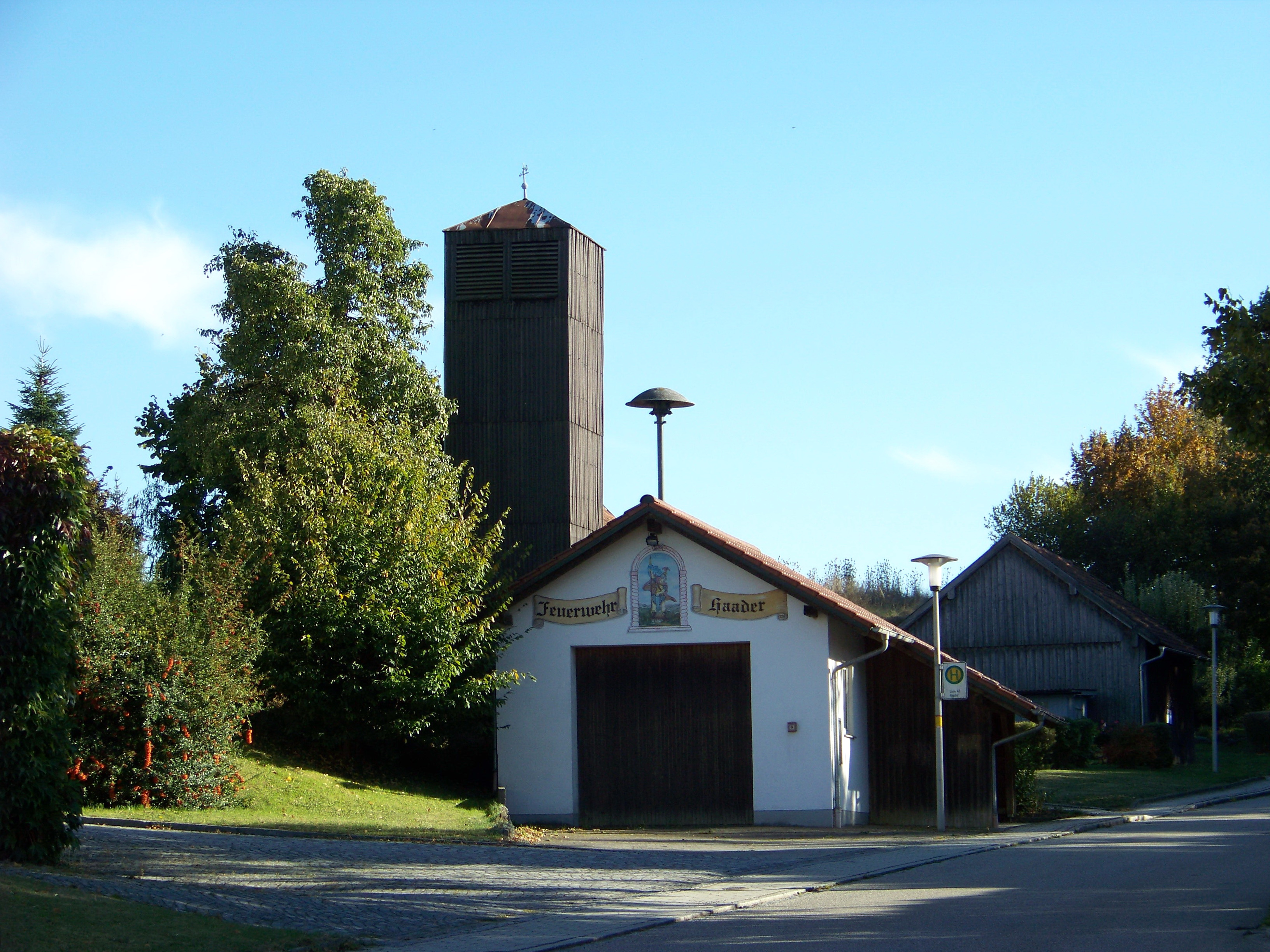 Laberweinting, Haader 39. Feuerwehrgerätehaus mit Schlauchturm.